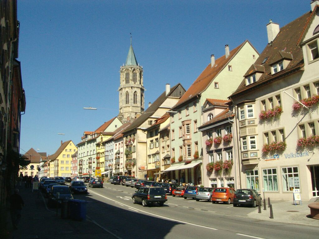 Rottweil: Kapellenkirche / Hochbrücktorstraße